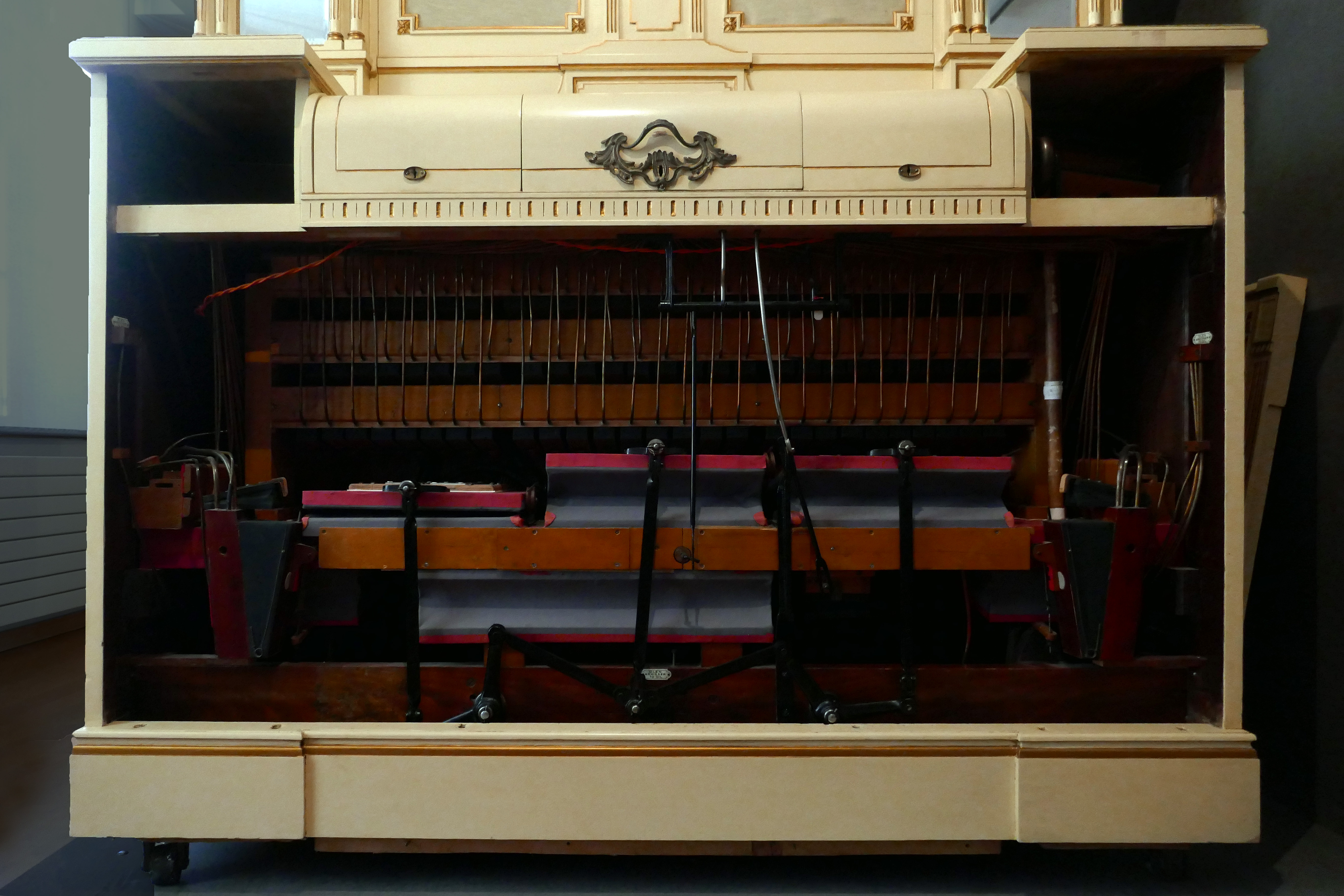 Piano Welte Mignon Piano pneumatique expressif Fribourg, Allemagne, 1905 Rouleau à papier perforé et moteur électrique Maison de la musique mécanique et de la dentelle de Mirecourt (Vosges).